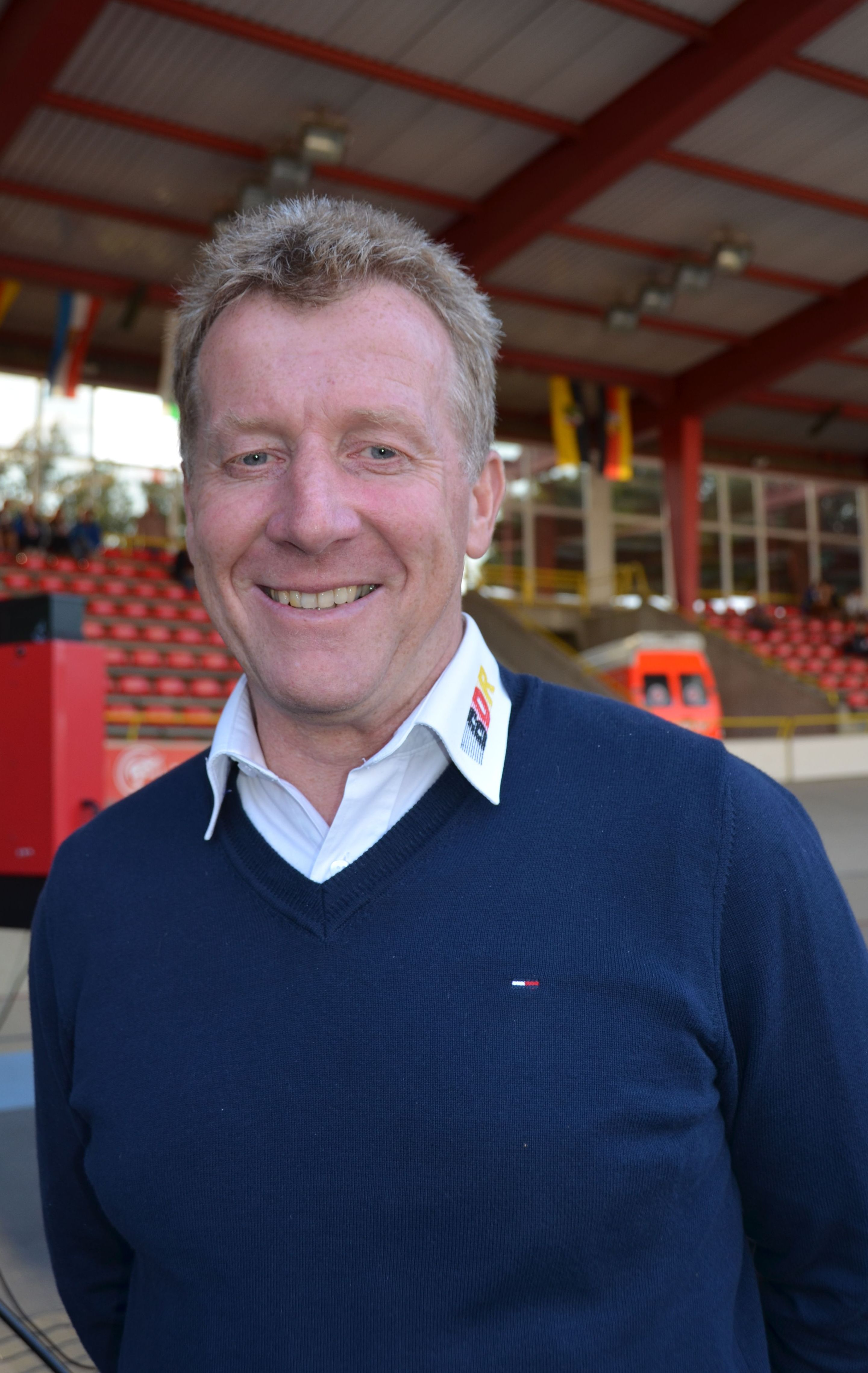 Patrick Moster, deutscher Radsportfunktionär